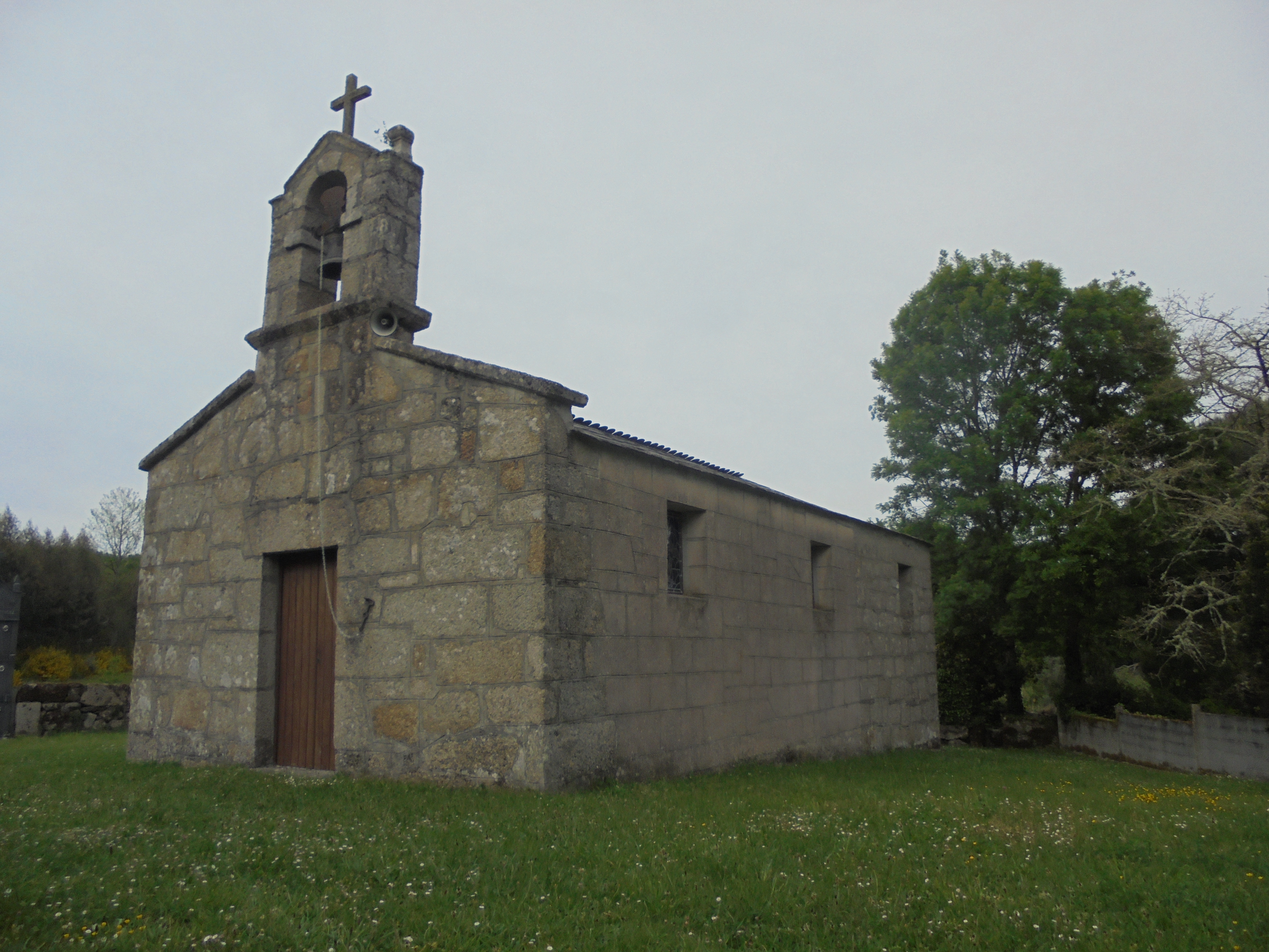 Igrexa de San Clodio de Aguiar ( Outeiro de Rei)